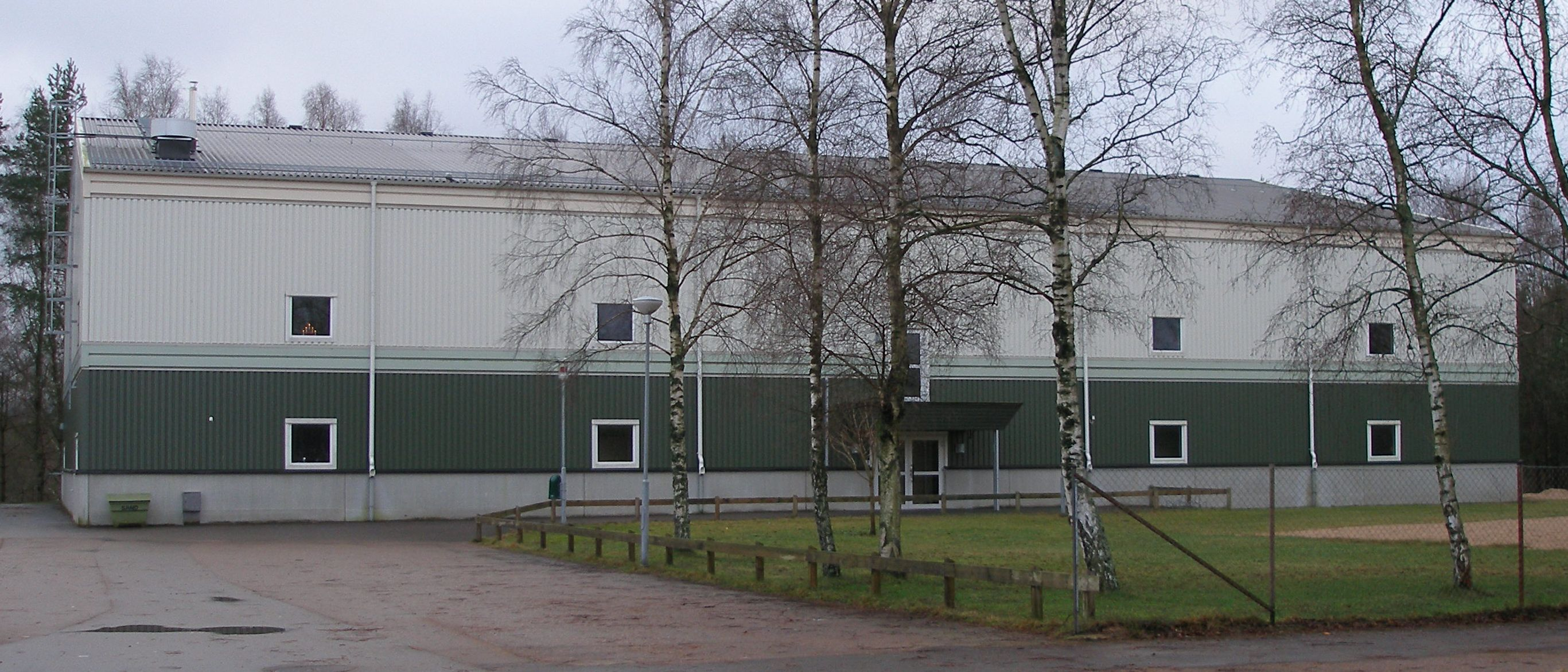 bild på Idrottshallen i Våxtorp. Tagen av Ruthger Persson. Licensierad i enlighet med cc-by-sa-2.5 .